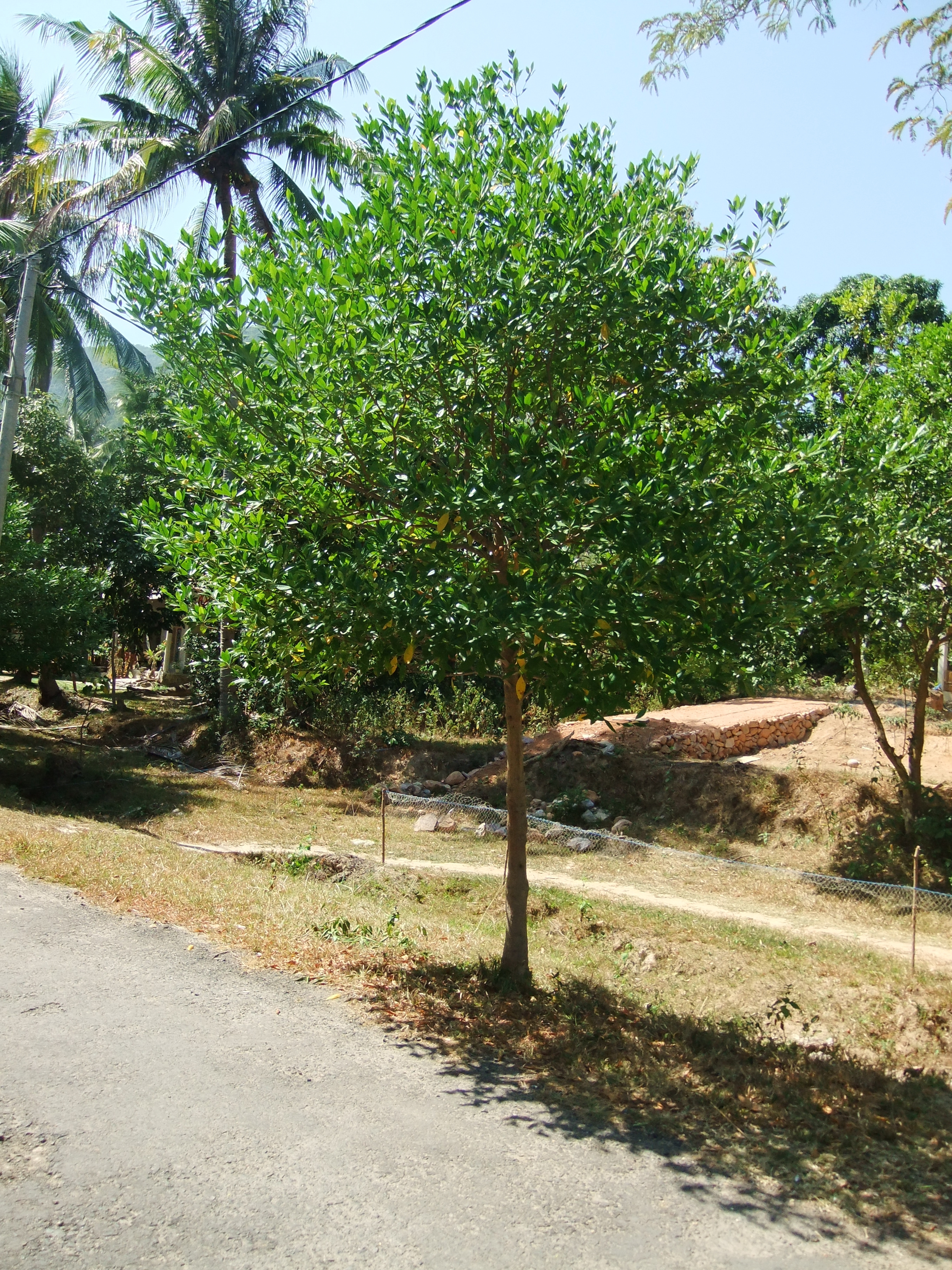 Pohon Dewadaru, Karimun Jawa